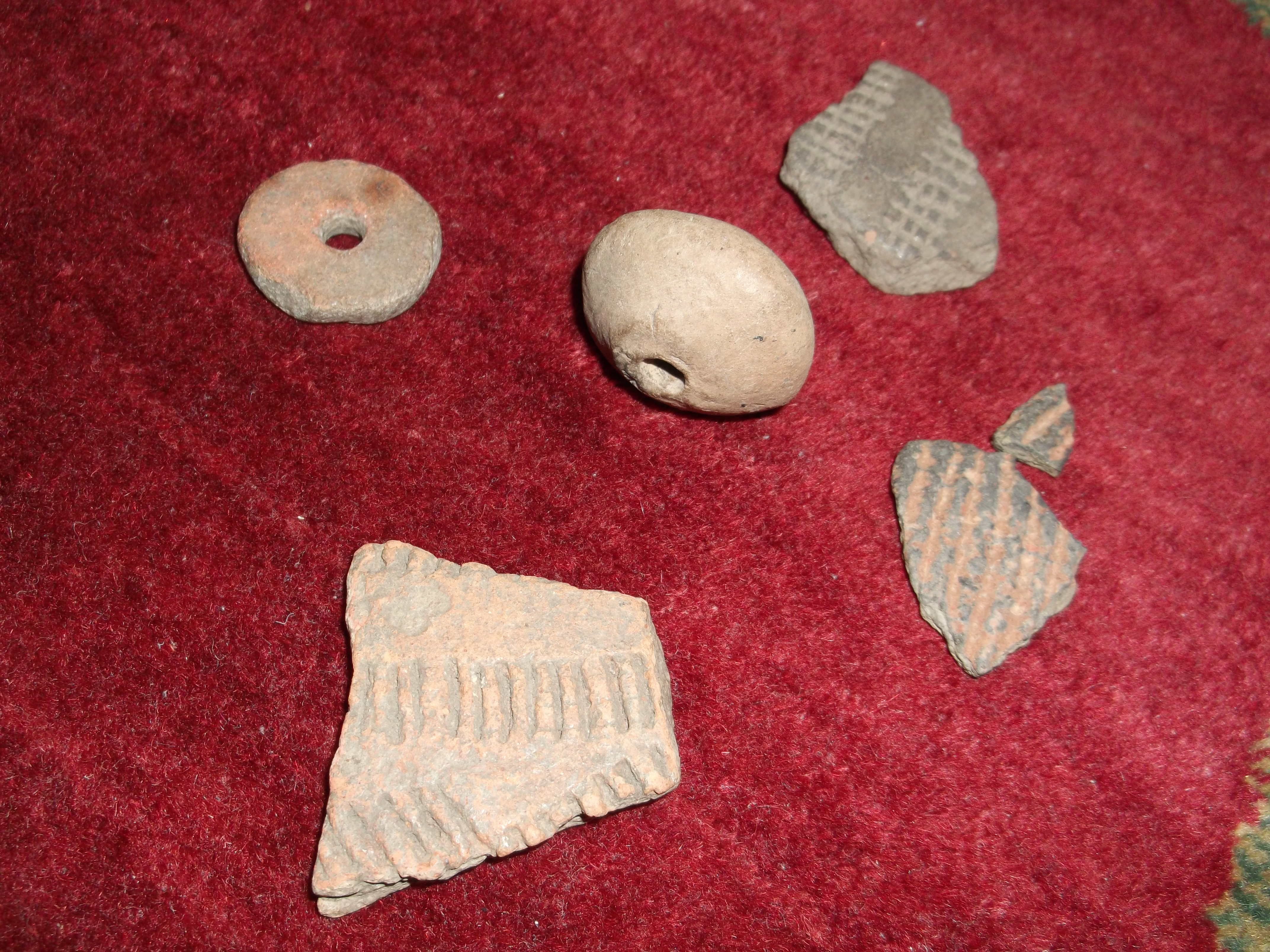 Obiecte din neolitic ; fragmente de ceramica si fusaiole , desoperite pe raza comunei Suatu, satul Aruncuta in 2011 .